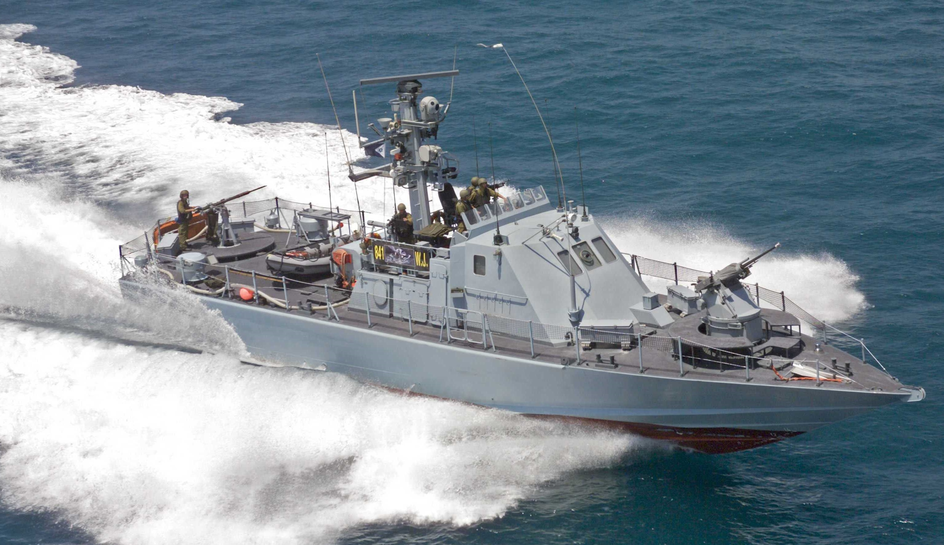 ספינה לבטחון שוטף מסדרת שלדג סימן מתוצרת מספנות ישראל